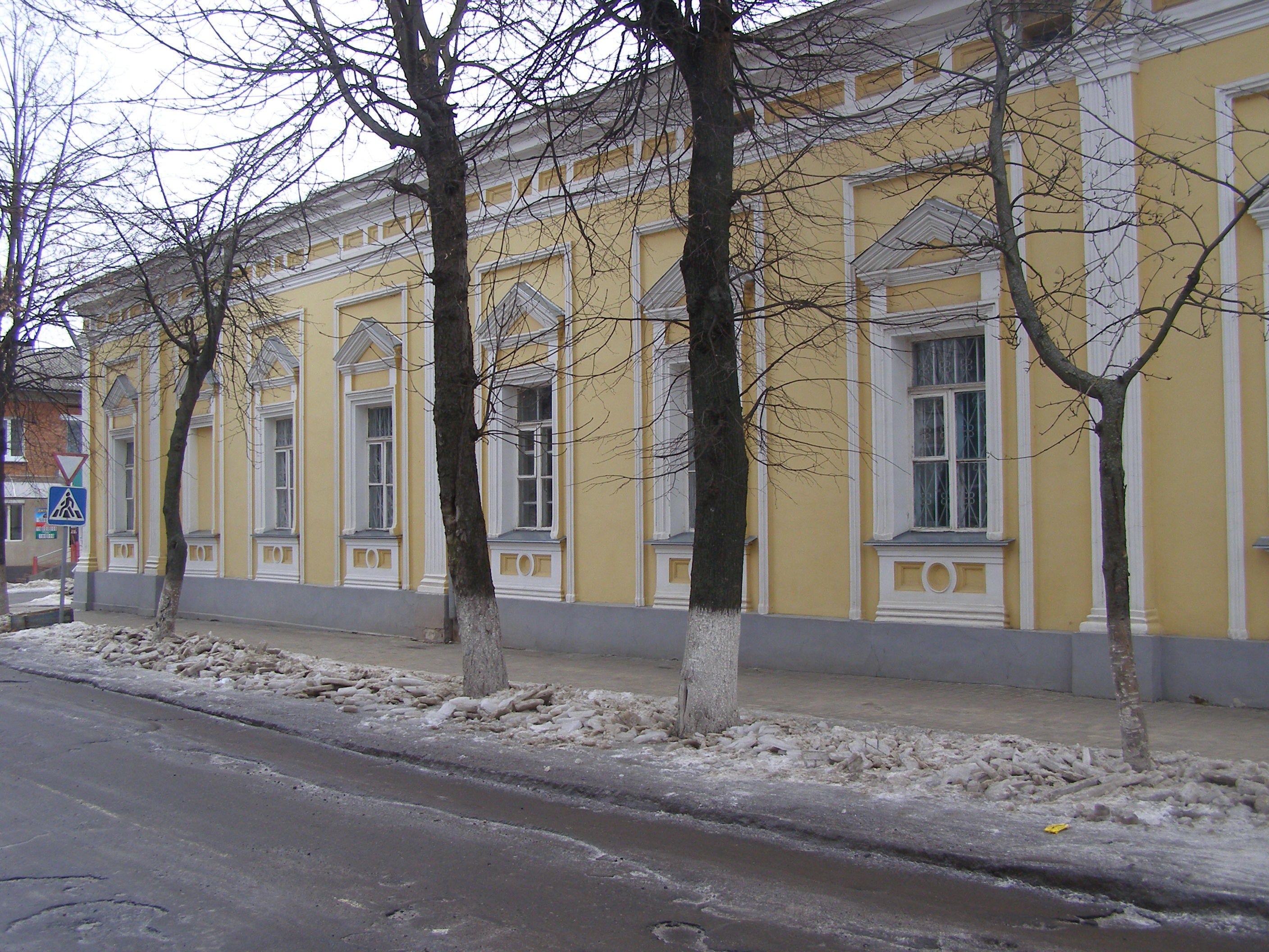 Садиба Неплюєвих, Глухів, вул. Києво-Московська, 43 Західна сторона